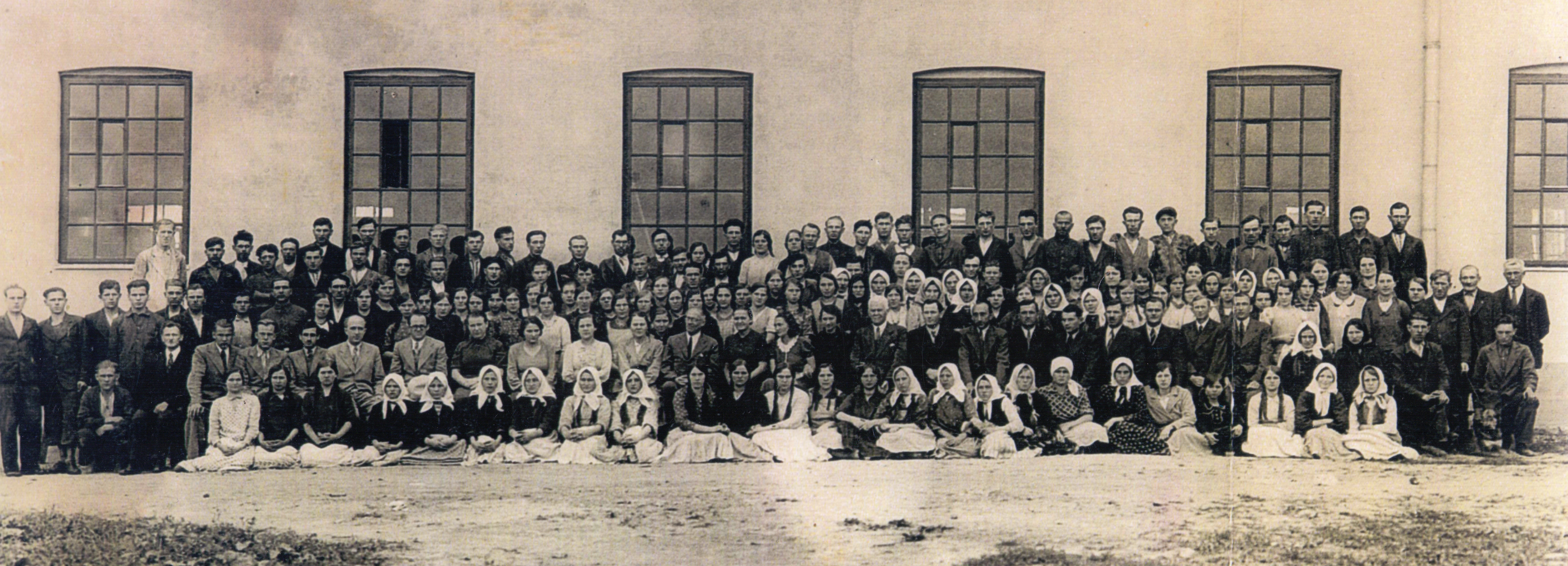 Jedna z dwóch zmian pracowników fabryki samodziałów w Leszczkowie, powiat sokalski, województwo lwowskie (obecnie Ukraina).